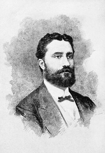 Ritratto giovanile del ministro Giovanni Nicotera, xilografia, ridotta, rielaborata.